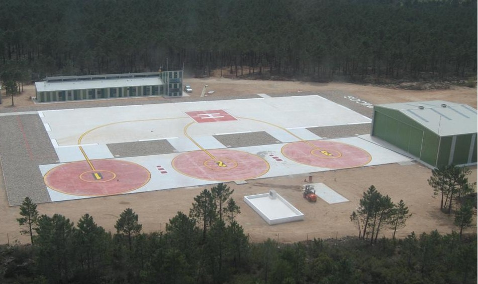 Imágenes del Centro Comarcal de Emergencias de Molinicos, situadas en la Base Aérea de Cañadillas (Fuente -Higuera)